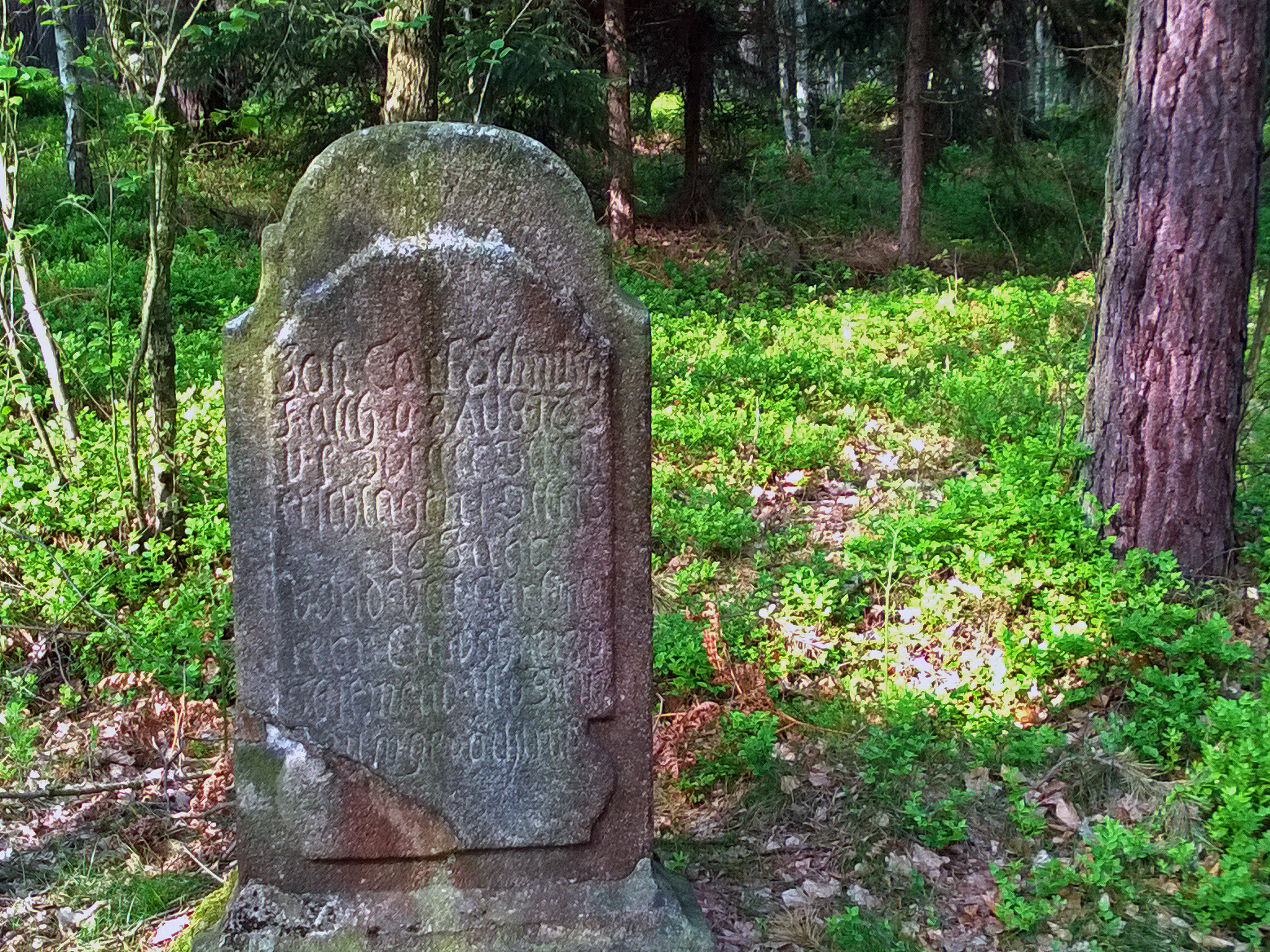 Gedenkstein bei Jänkendorf